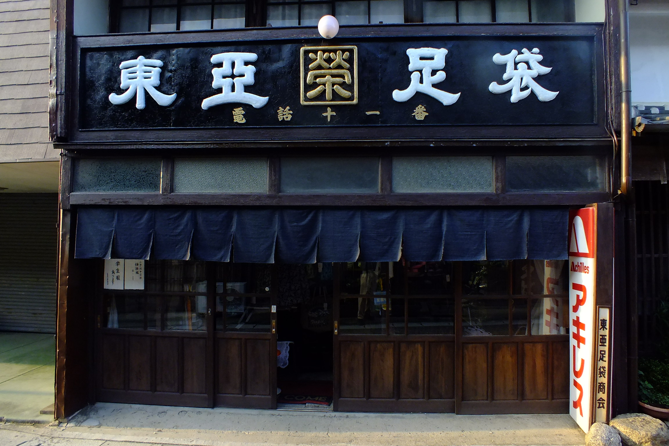 2016-08-05 Tokaido Seki Juku Kameyama City Mie,東海道五十三次 関宿